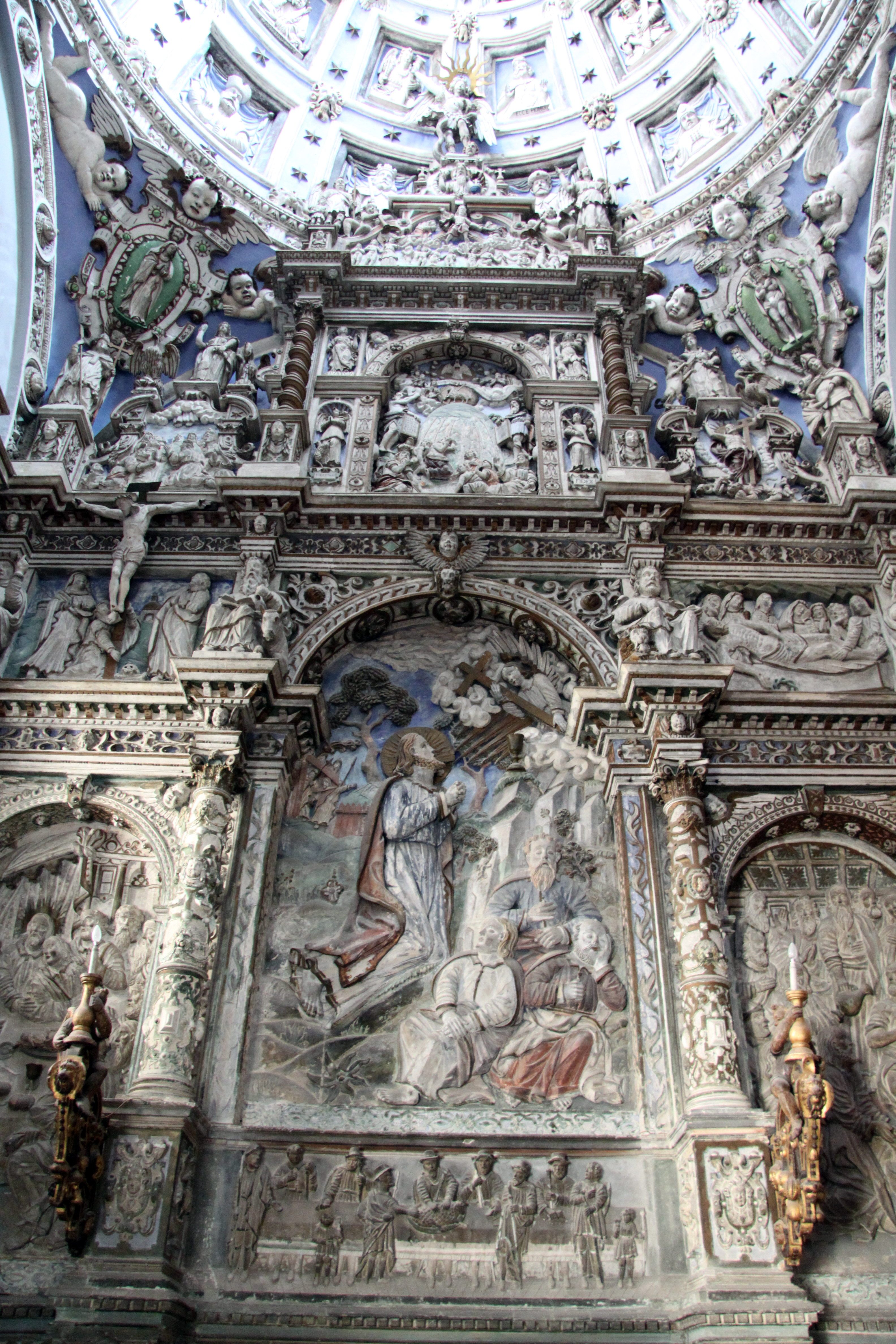 каплиця Боїмів, Львів, Катедральна пл., 1